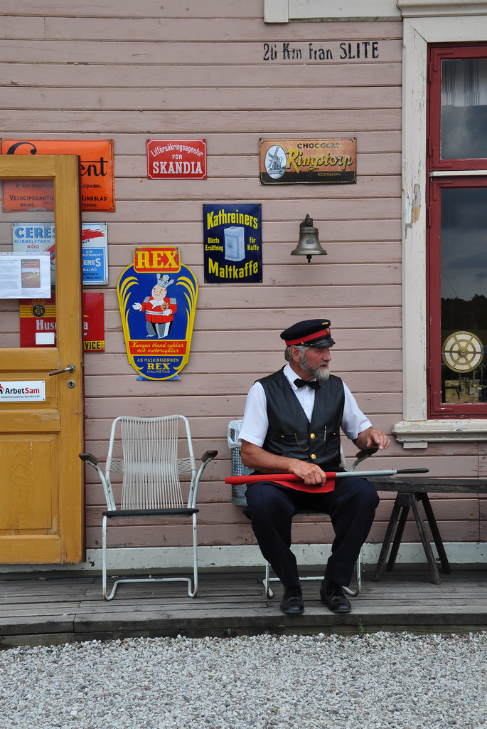 Gotland kn, Dalhem Hässelby 2:1 o Dalhem Dungårde 1:23 o Halla Tule 1:8 o Halla Nygranne 1:15 o Halla Dalbo 2:1 o Halla Tomte 1:25 o Halla Tule 1:7 och 3:1 HESSELBY OCH TULE JÄRNVÄGSSTATIONER, fotot är taget vid Hesselby station